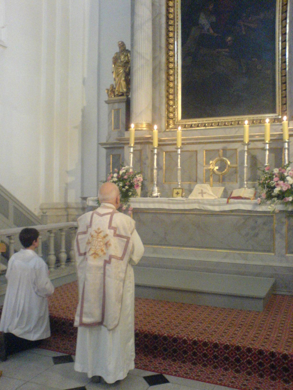 Kapłan celebrujący nabożeństwo Kościoła Starokatolickiego Mariawitów w krakowskim kościele ewangelickim św. Marcina - zdjęcie zamieszczono za zgodą jego autora: Jarosława Kubackiego.